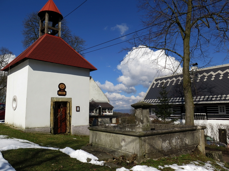 Kašna, u kaple na návsi, Rytířov, Rytířov.